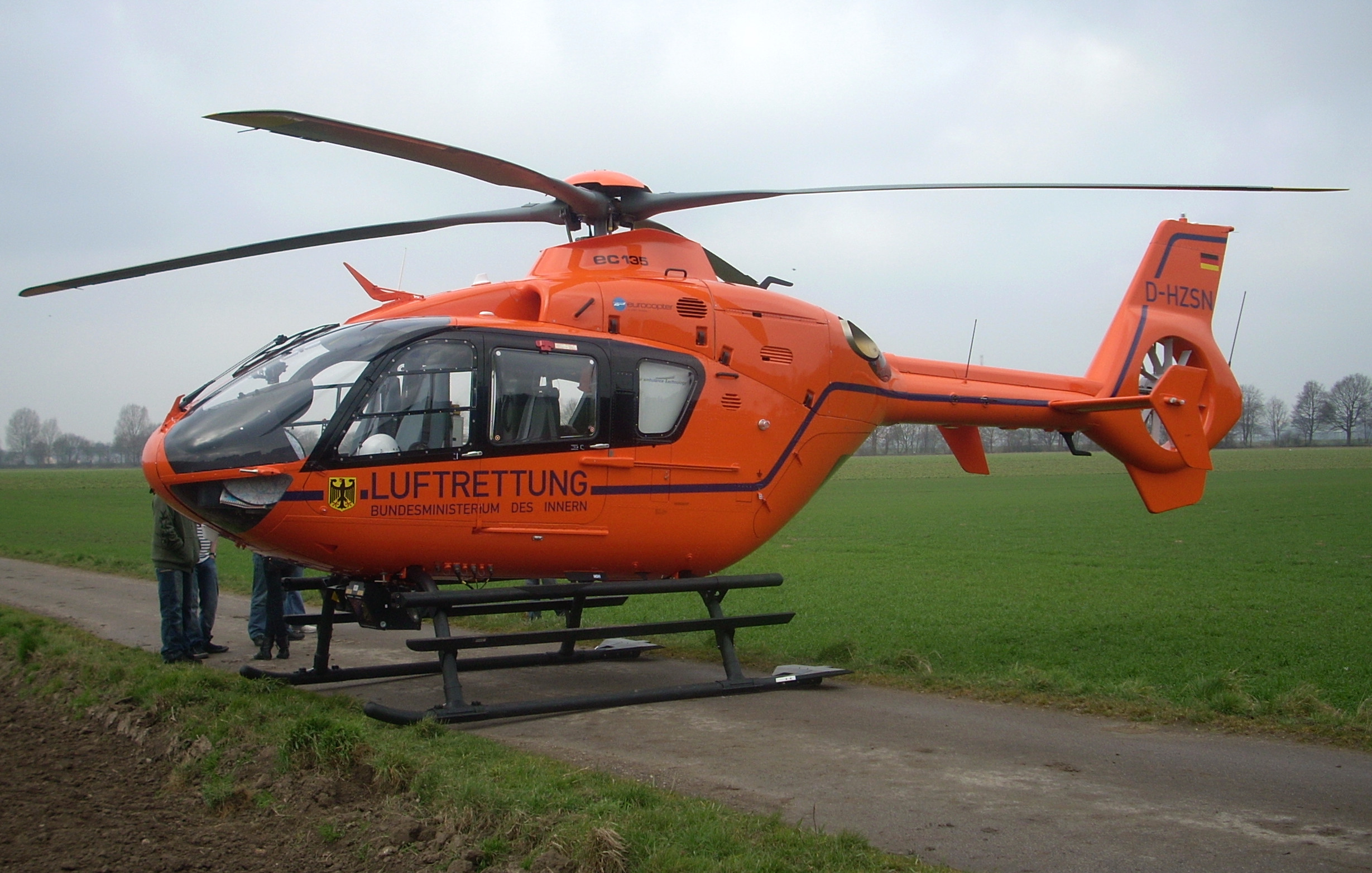 Rettungshubschrauber „Christoph 9“ (Duisburg)